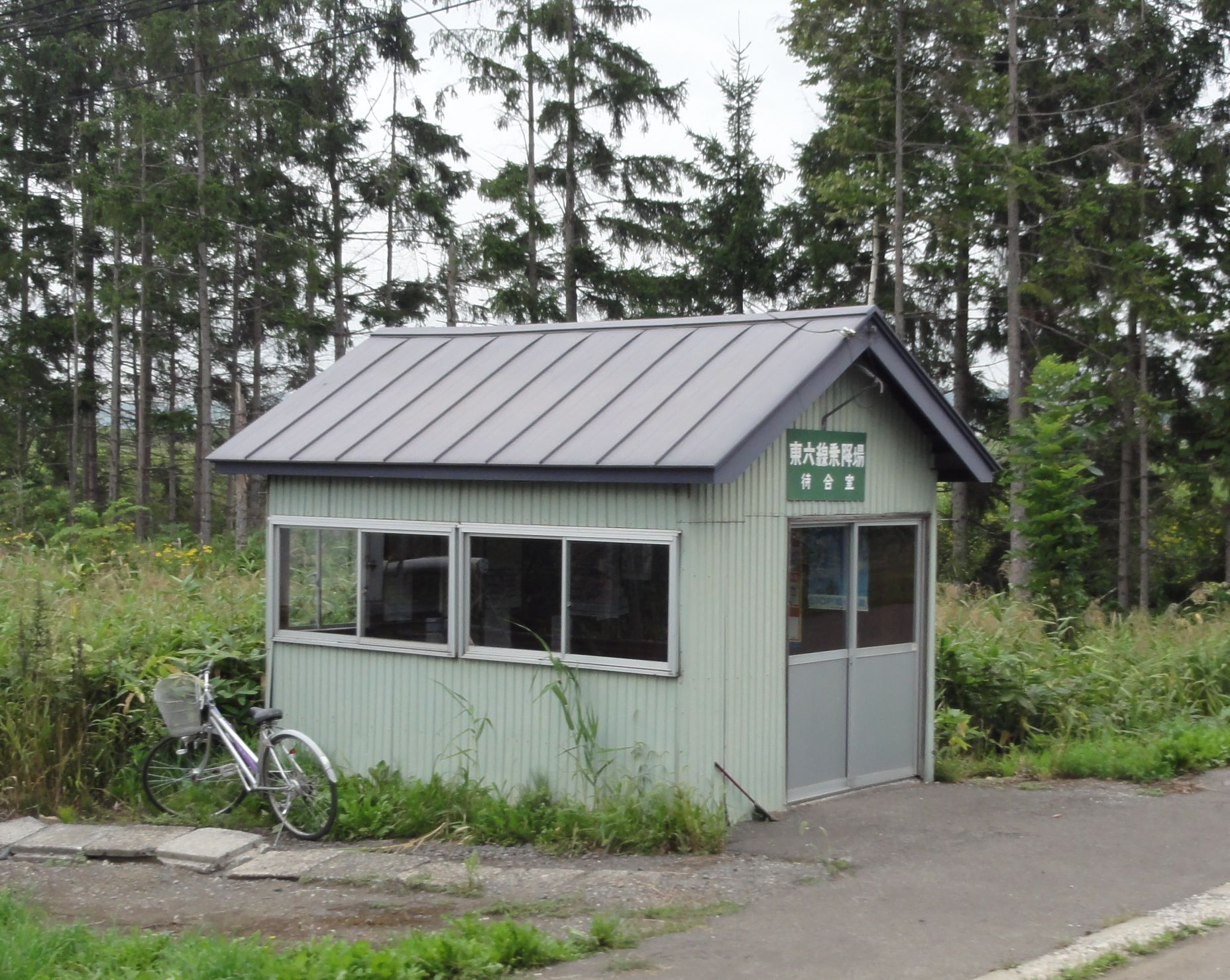 東六線駅待合室の小屋